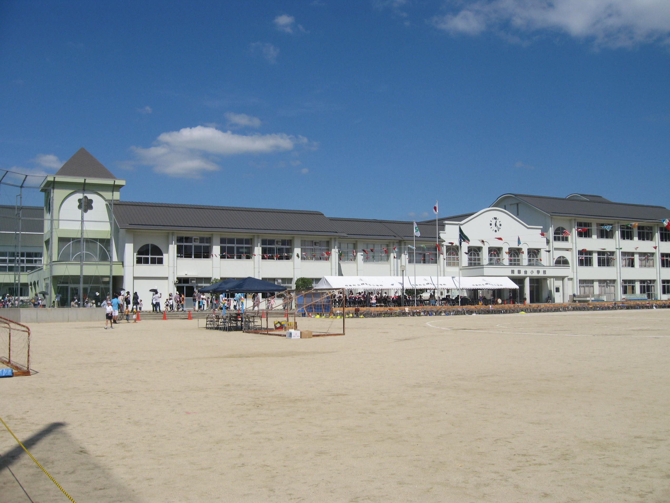 2011年9月24日にcrown userが撮影した精華台小学校（グラウンド）の画像